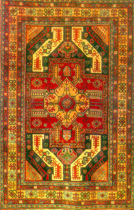 Армянский ковер из Хндзорецка - 19 век